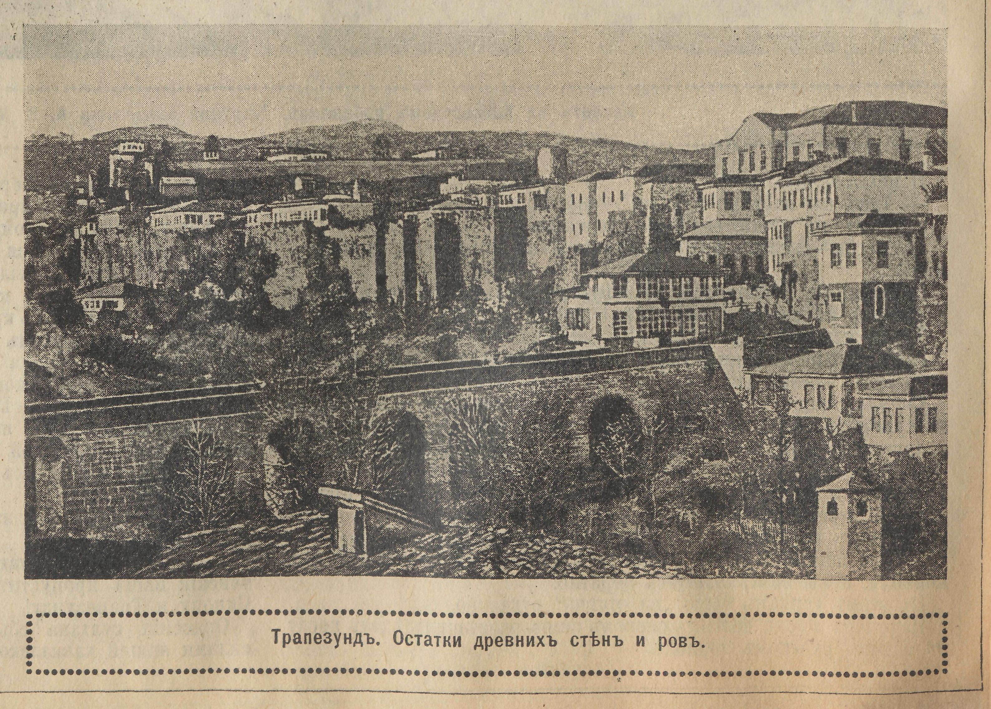 Русско-турецкий Кавказский фронт. Вид освобожденного от турок Трапезунда. Нива №25-1916